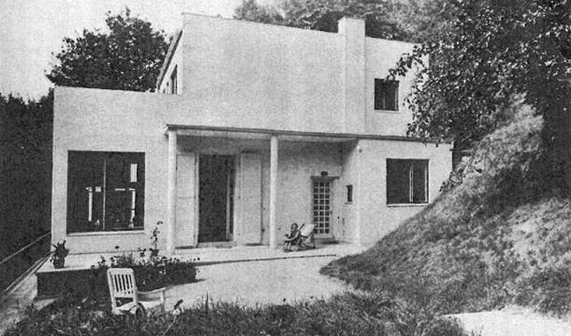 Vila Franze Nožičky, Česká Kamenice, Na Vyhlídce č.p. 358, spolu s Victorem Fürstem